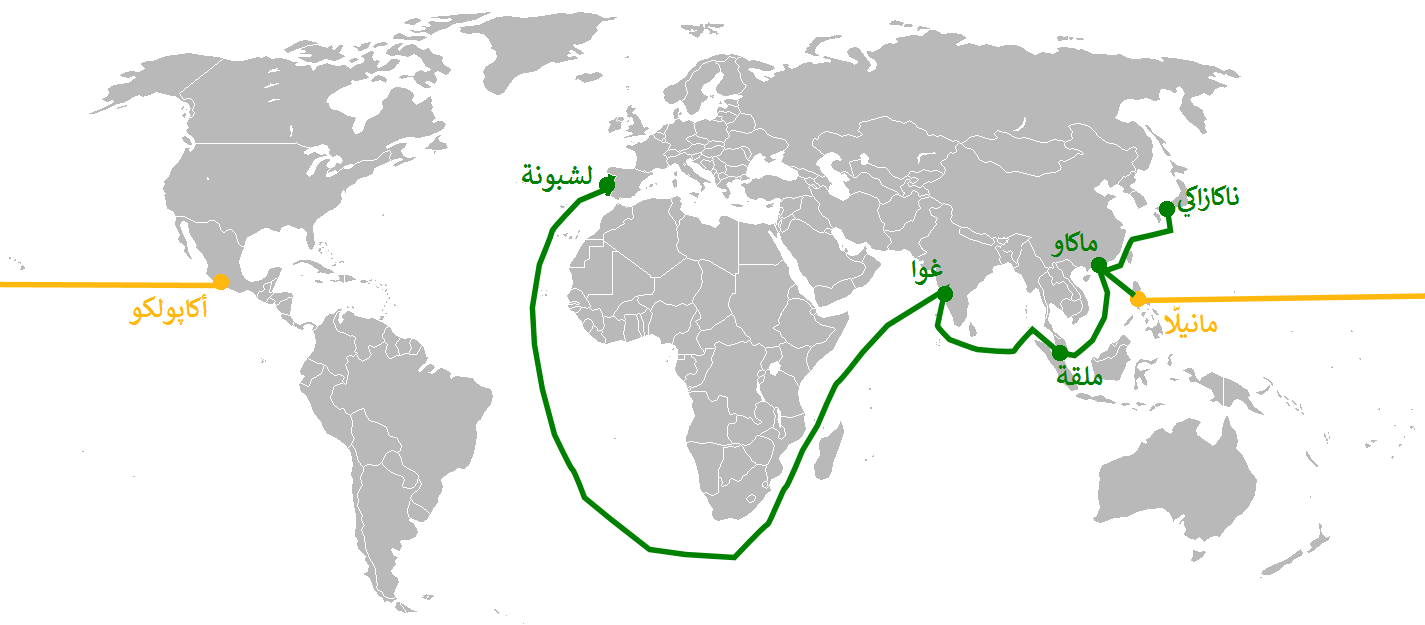 خريطة تُبيِّن موقع ماكاو على درب التجارة العالمي ما بين سنتيّ 1580 و1640م. اللون الأخضر يُشير إلى الپُرتُغال ودُروب ملاحتها، بينما يُشيرُ الذهبي إلى إسپانيا ودُروب ملاحتها. يُرجى العلم بأنَّ الخريطة لا تُمثِّل طُرق الملاحة الفعليَّة التي كانت تسلكها الدولتين سالفتا الذِكر عند تجارتهما مع الشرق الأقصى.